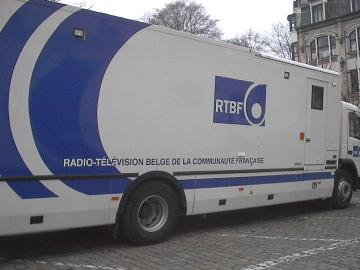 reportagewagen te Verviers, eigen foto